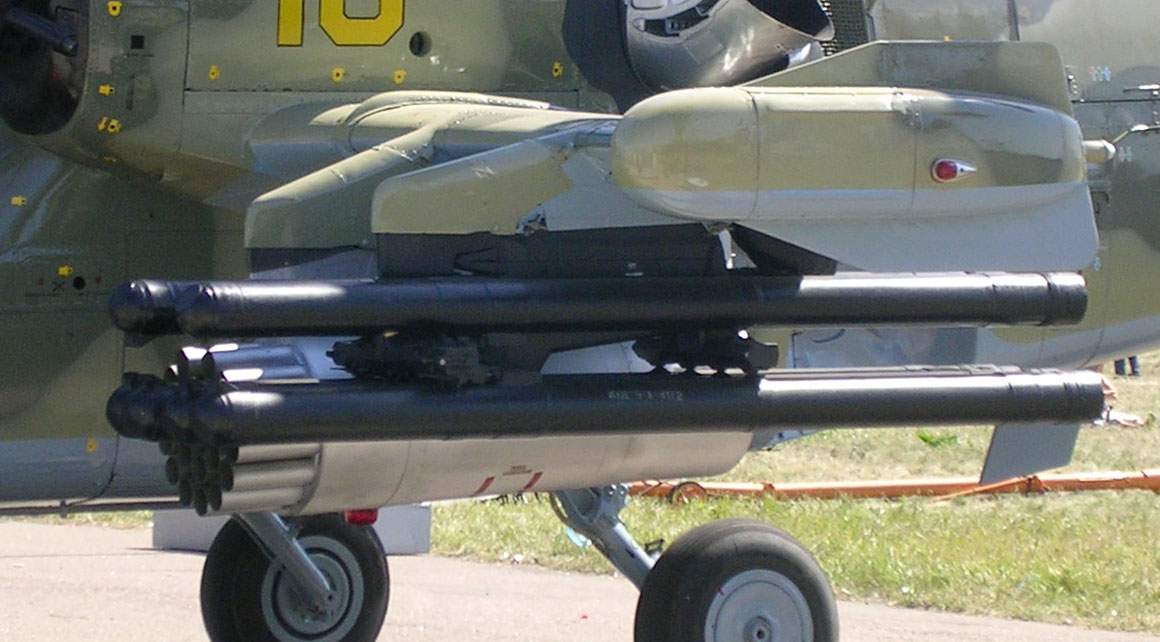 ПТРК "Вихрь" под крылом Ка-50 на МАКС-2009